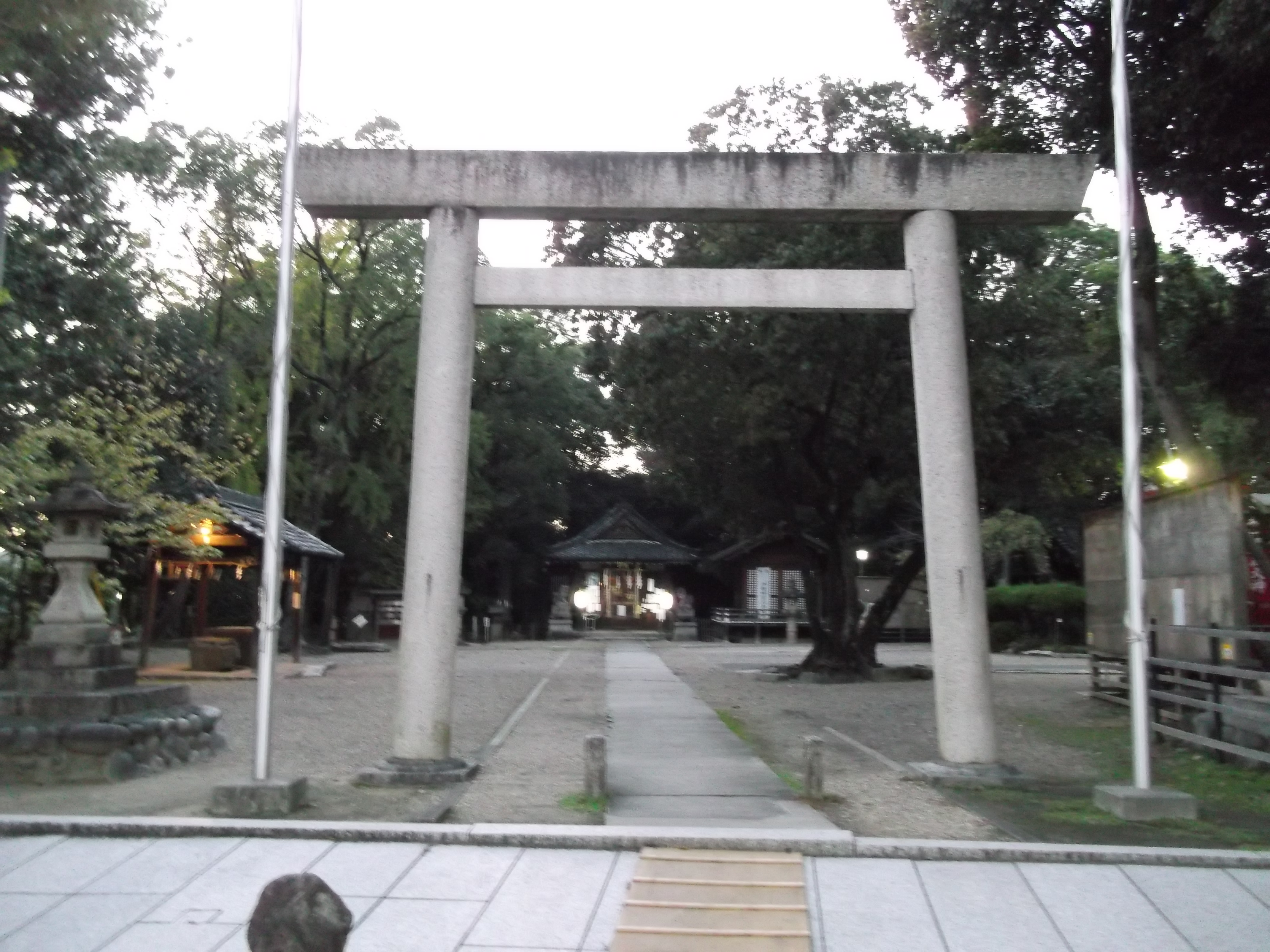 名古屋市千種区丸山町鎮座の丸山神明社正面鳥居